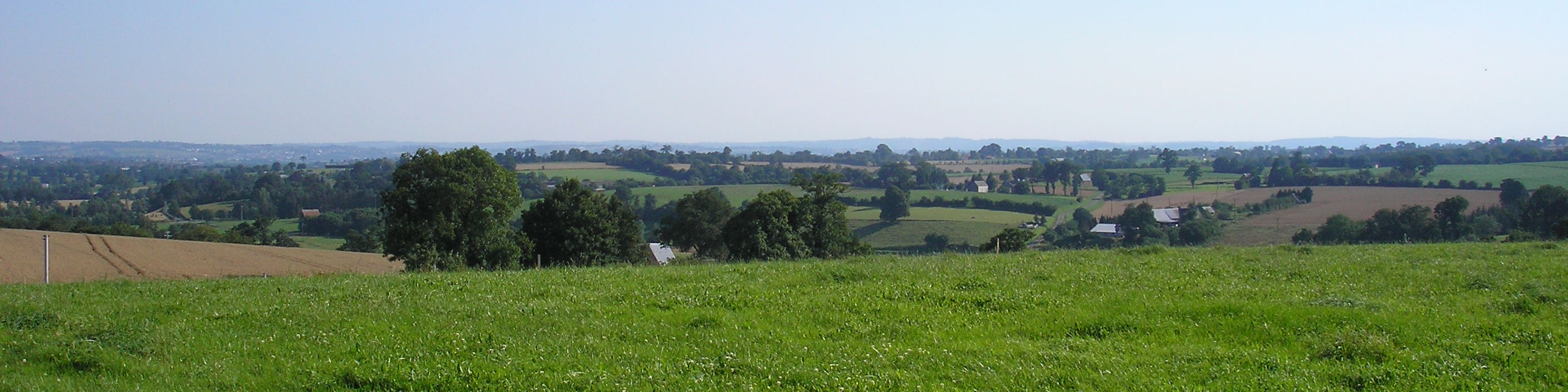 Vue du Bocage virois de Carville vers le sud.